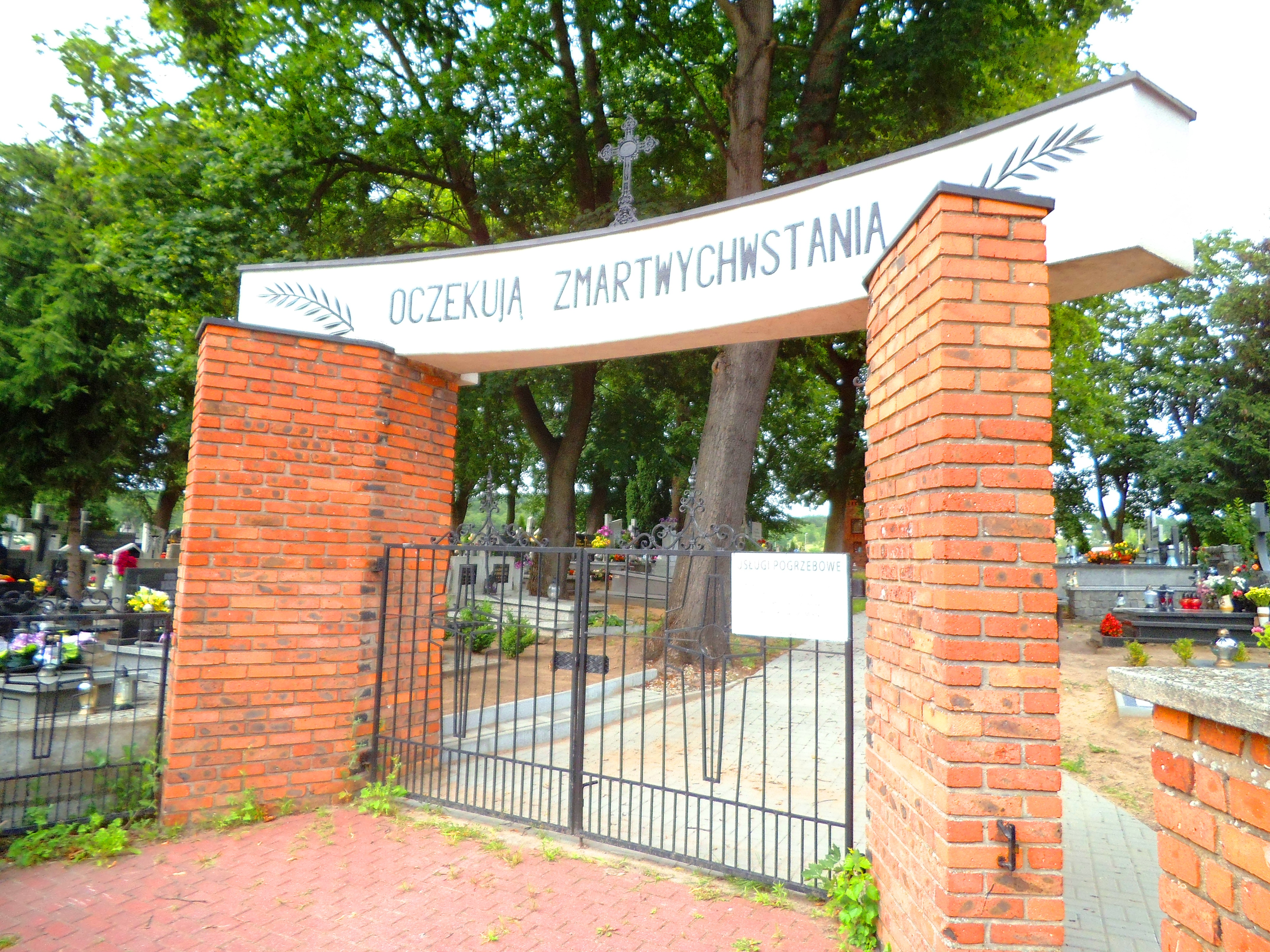 Cmentarz Podwyższenia Krzyża Świętego w Toruniu